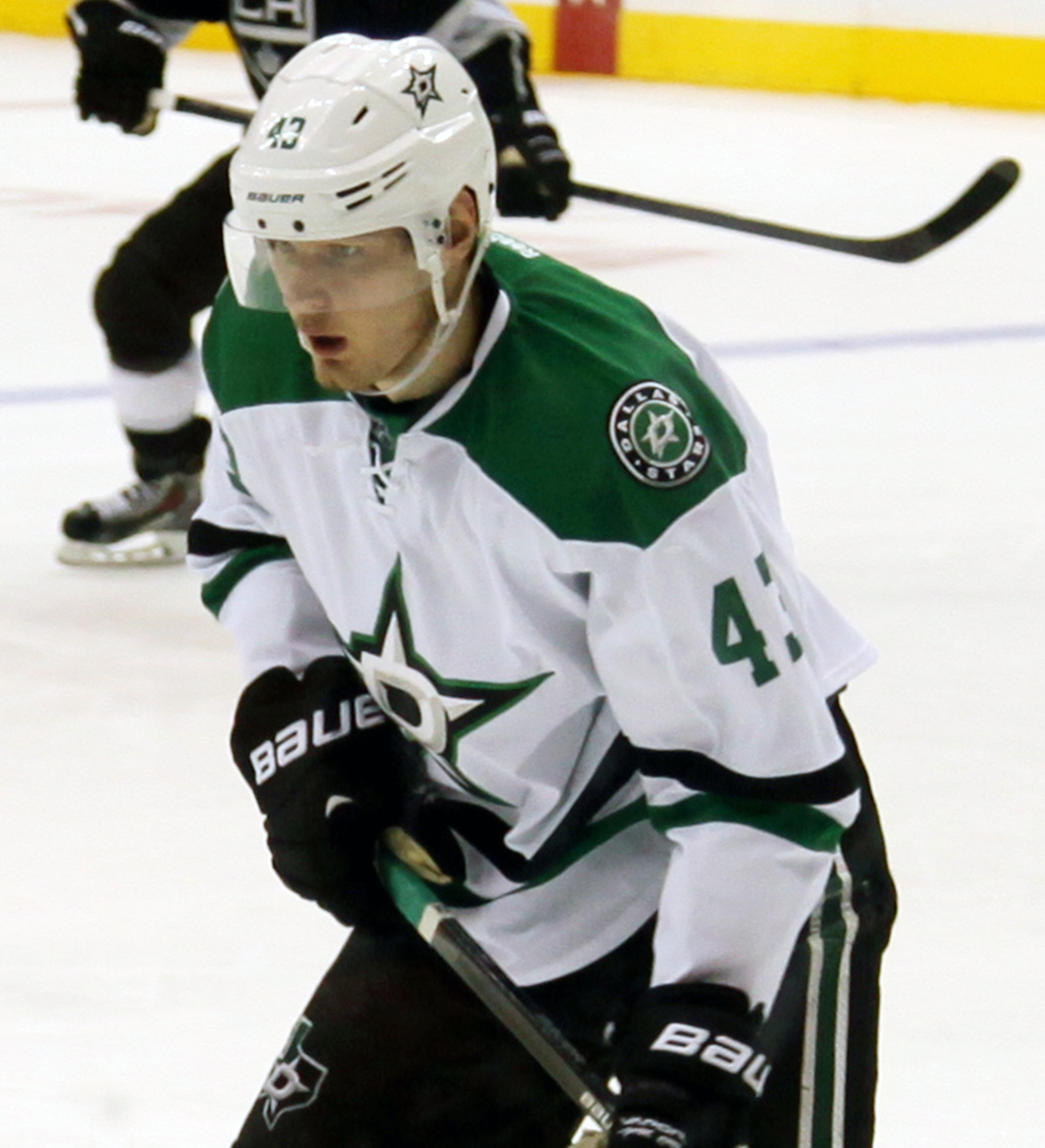 Valeri Nichushkin in December 2013.